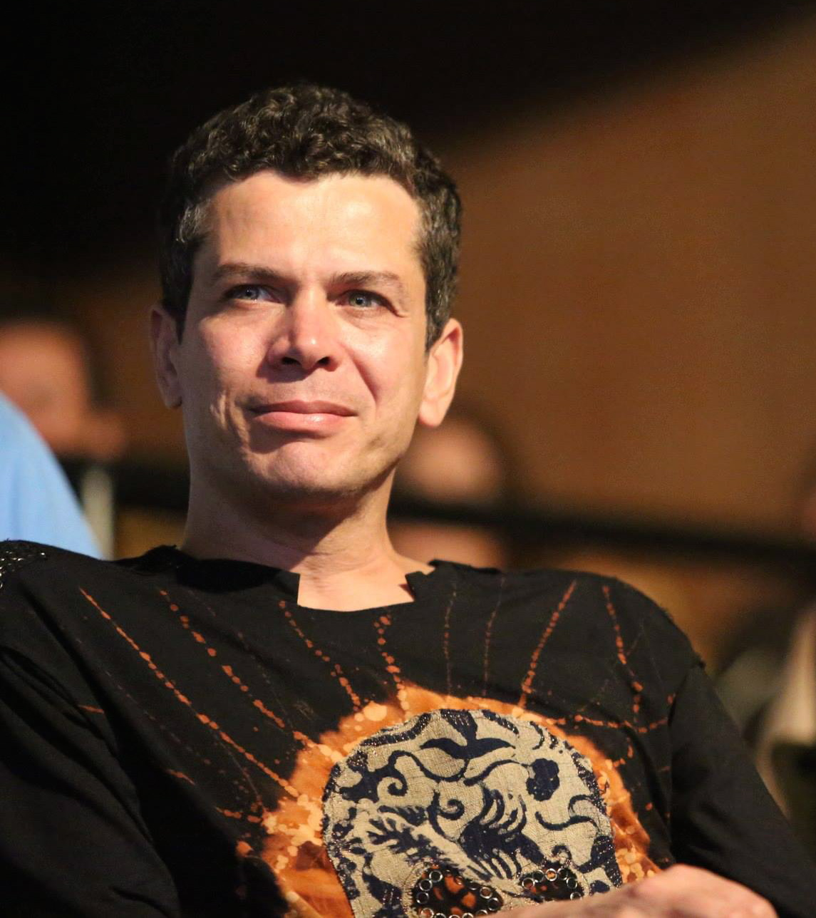 Wagner Schwartz